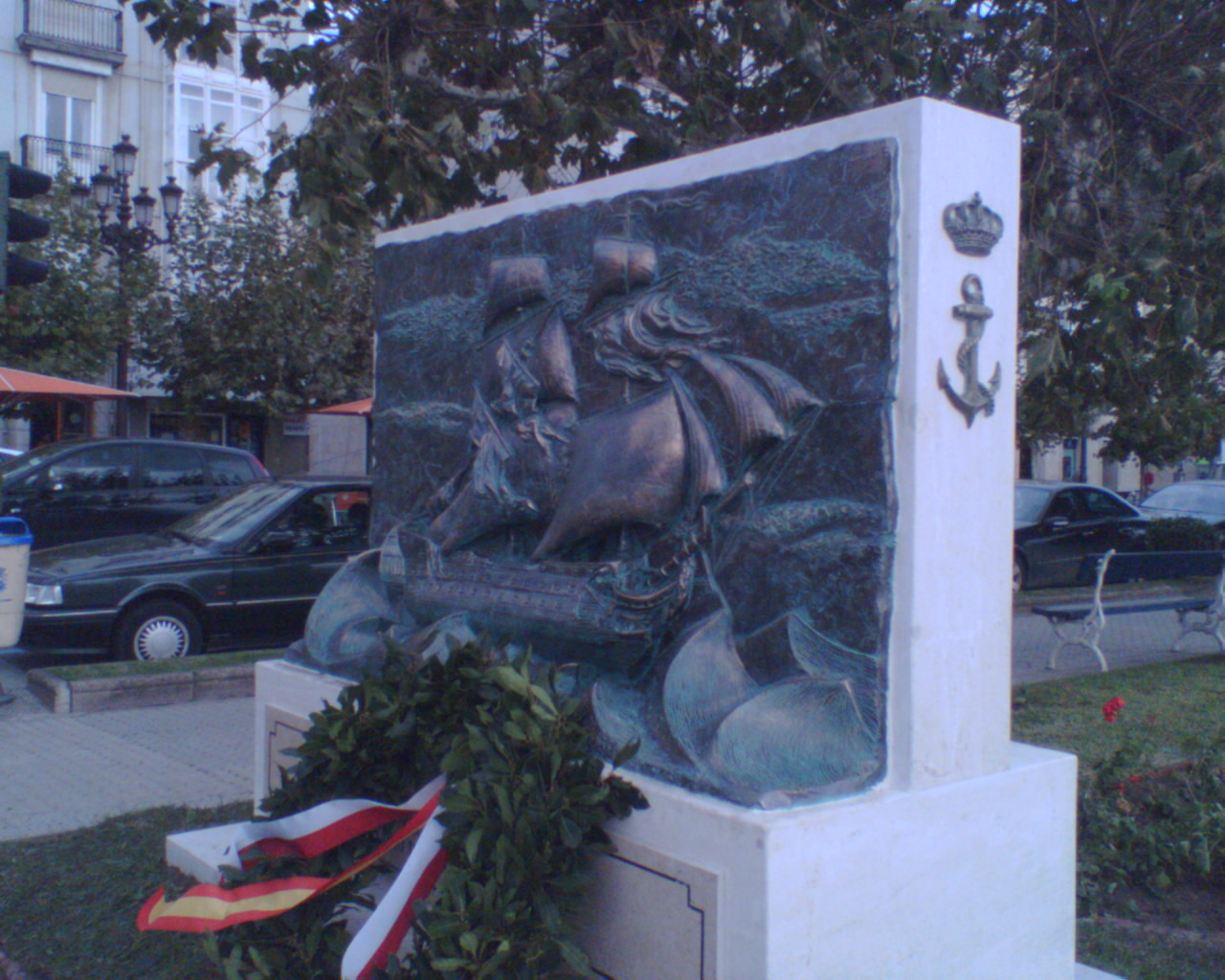 Monumento sito en los Jardines de Pereda, Santander.